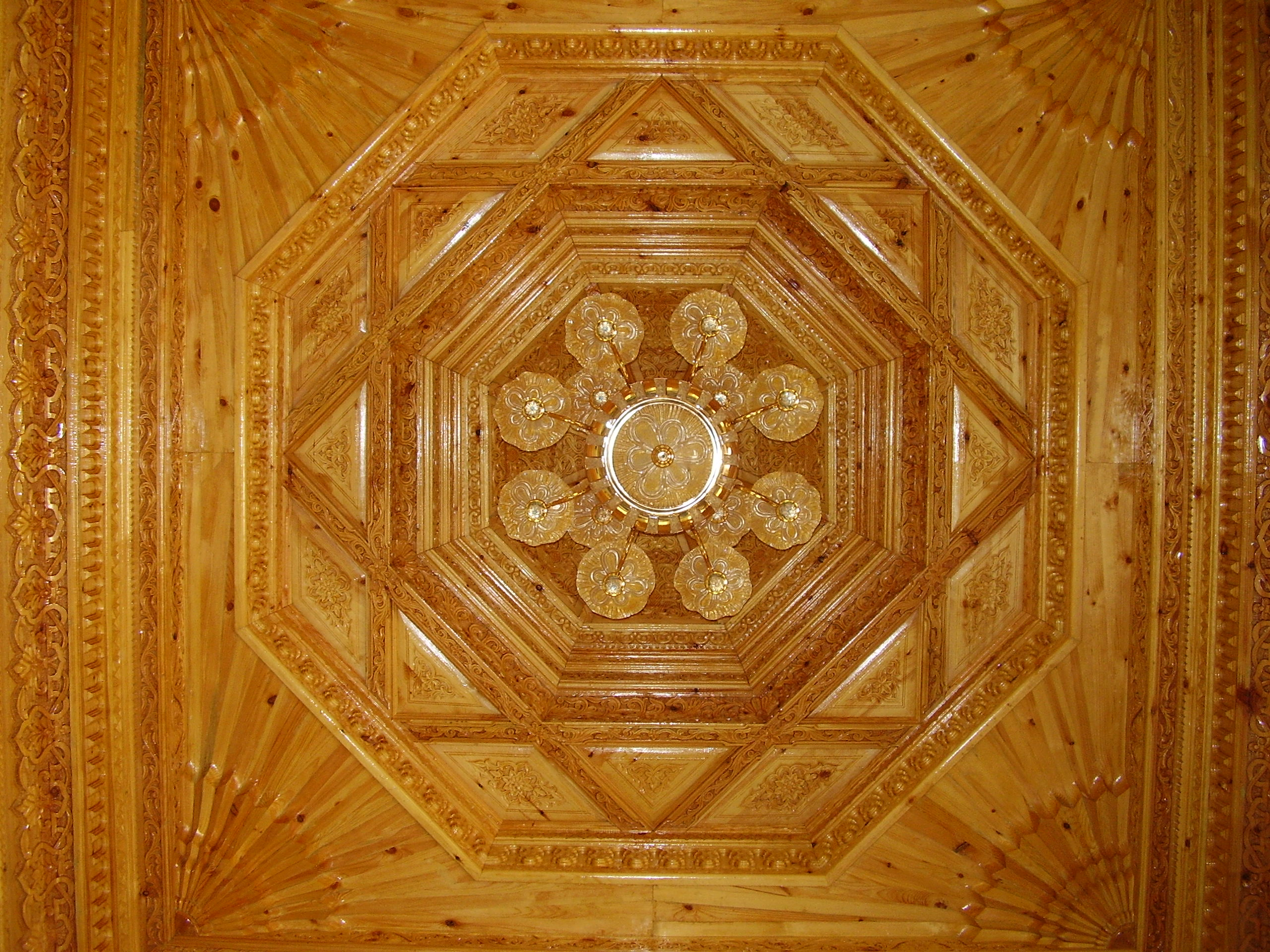 Tajik tea-house ceiling